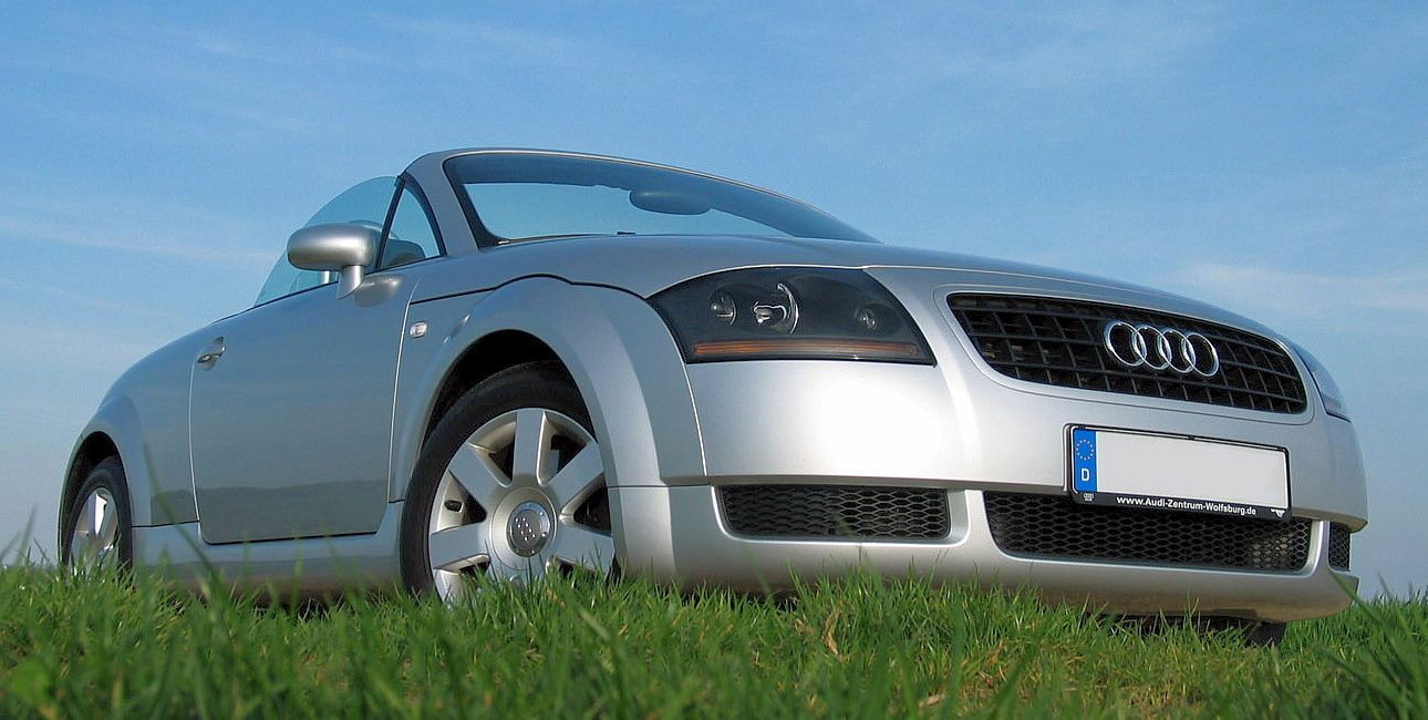 Audi TT Roadster